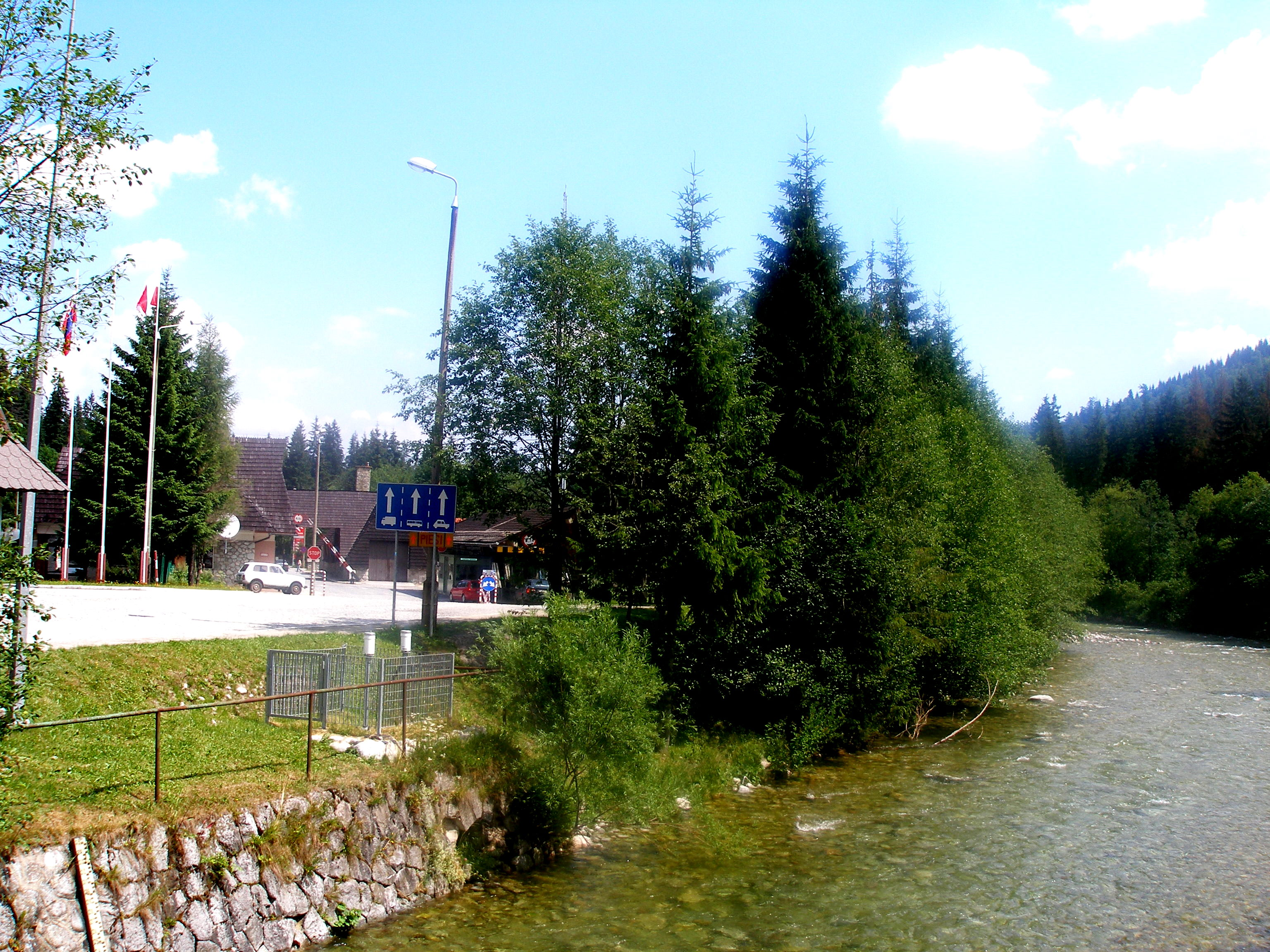 Podtatranská obec Tatranská Javorina časť Lysá Poľana